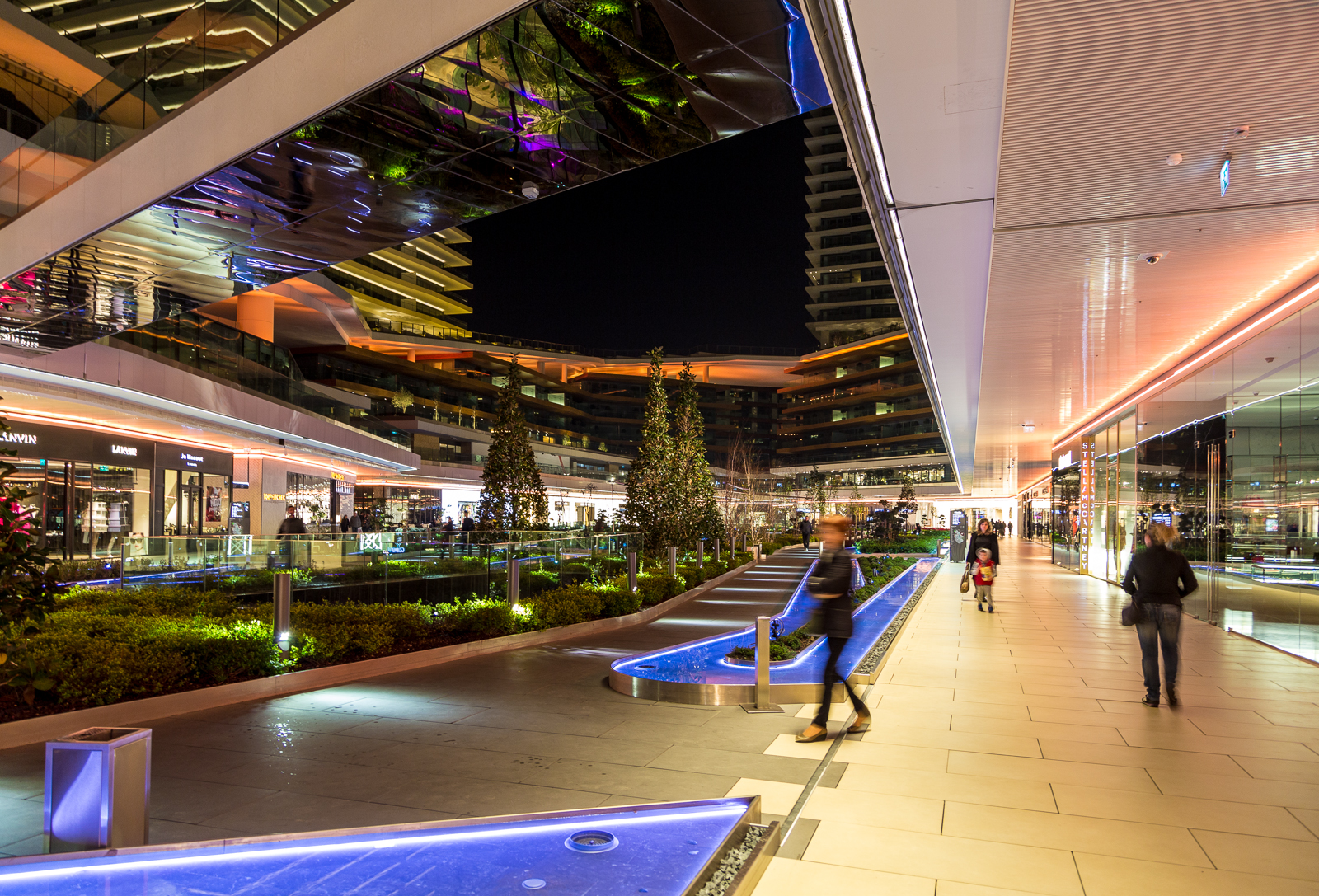 Interieur van het Zorlu Center te Istanboel